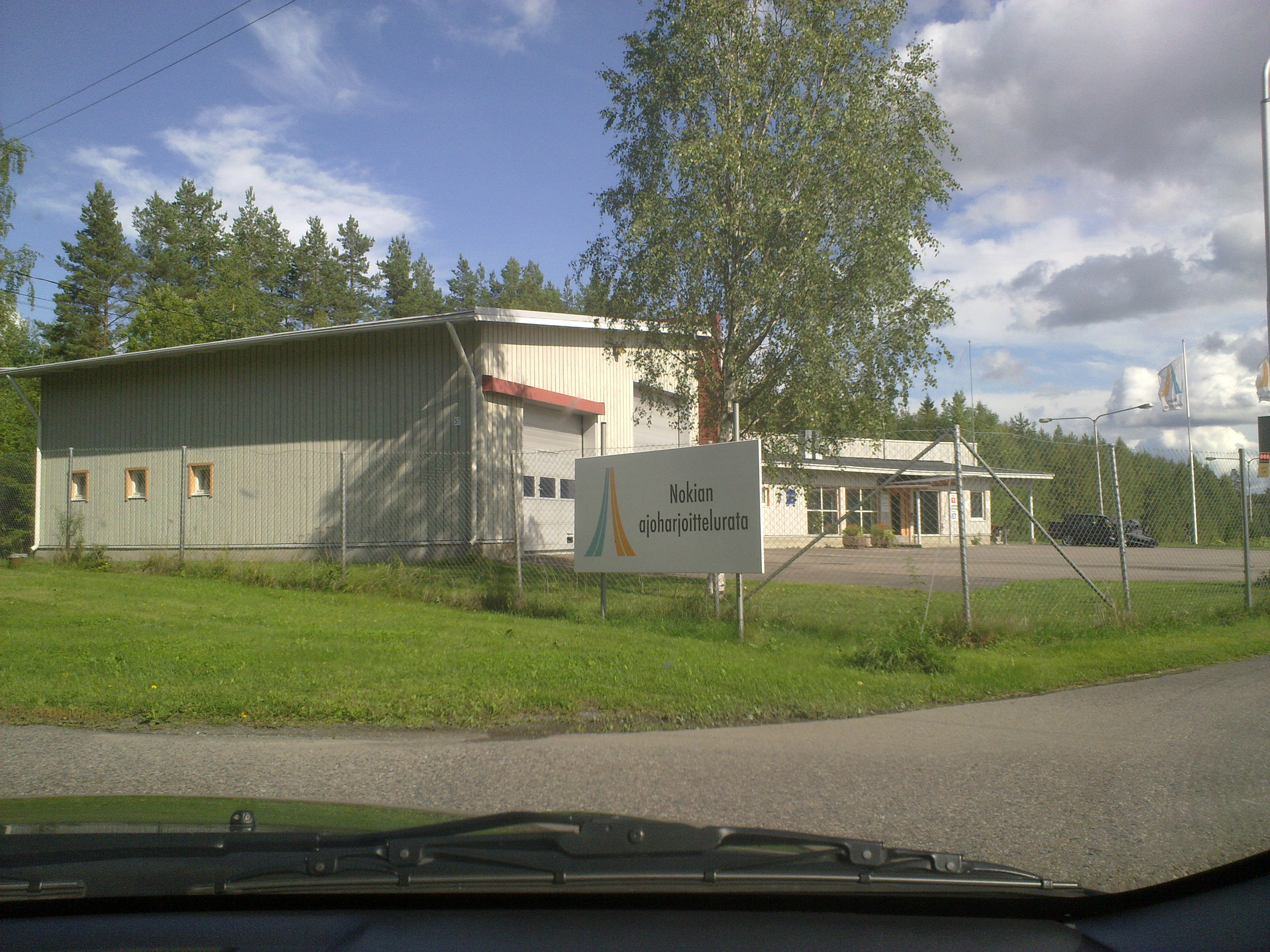 Nokian ajoharjoittelurata